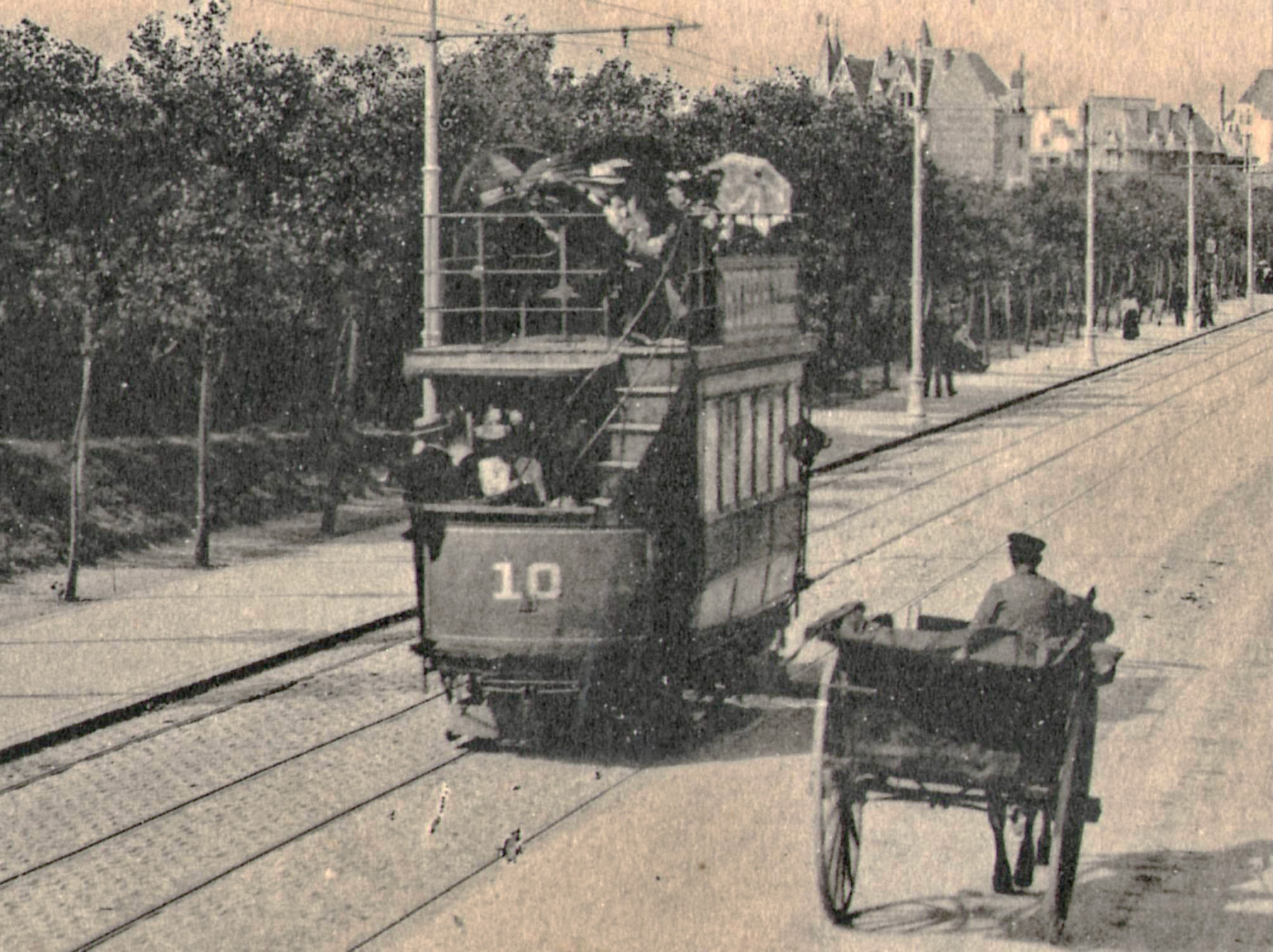 Détail de la carte postale ancienne éditée par LL, n°97 : DUNKERQUE - Avenue des Bains de Mer. Gros plan sur une motrice électrique à accumulateurs et impériale du tramway de Dunkerque circulant sur l'avenue des Bains de Mer. La caténaire des nouveaux tramways à captage électrique aérien est déjà installée.